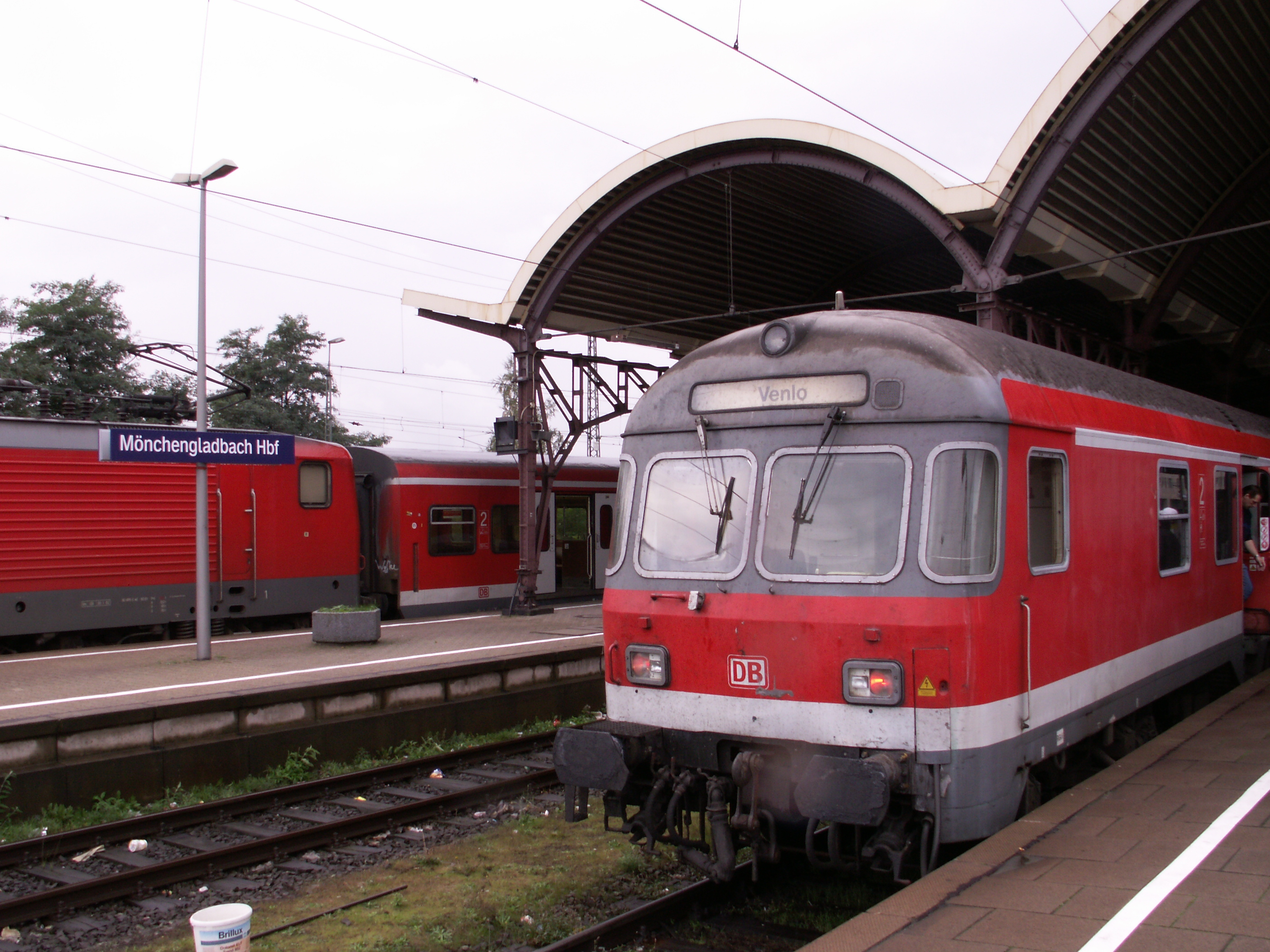 Ein Nahverkehrszug mit einem Kahrlsruher Steuerwagen nach Venlo in Mönchengladbach Hbf. Im Hintergrund ist eine DBAG-Baureihe 143 mit X-Wagen als S-Bahn der S-Bahn Rhein-Ruhr zu sehen.